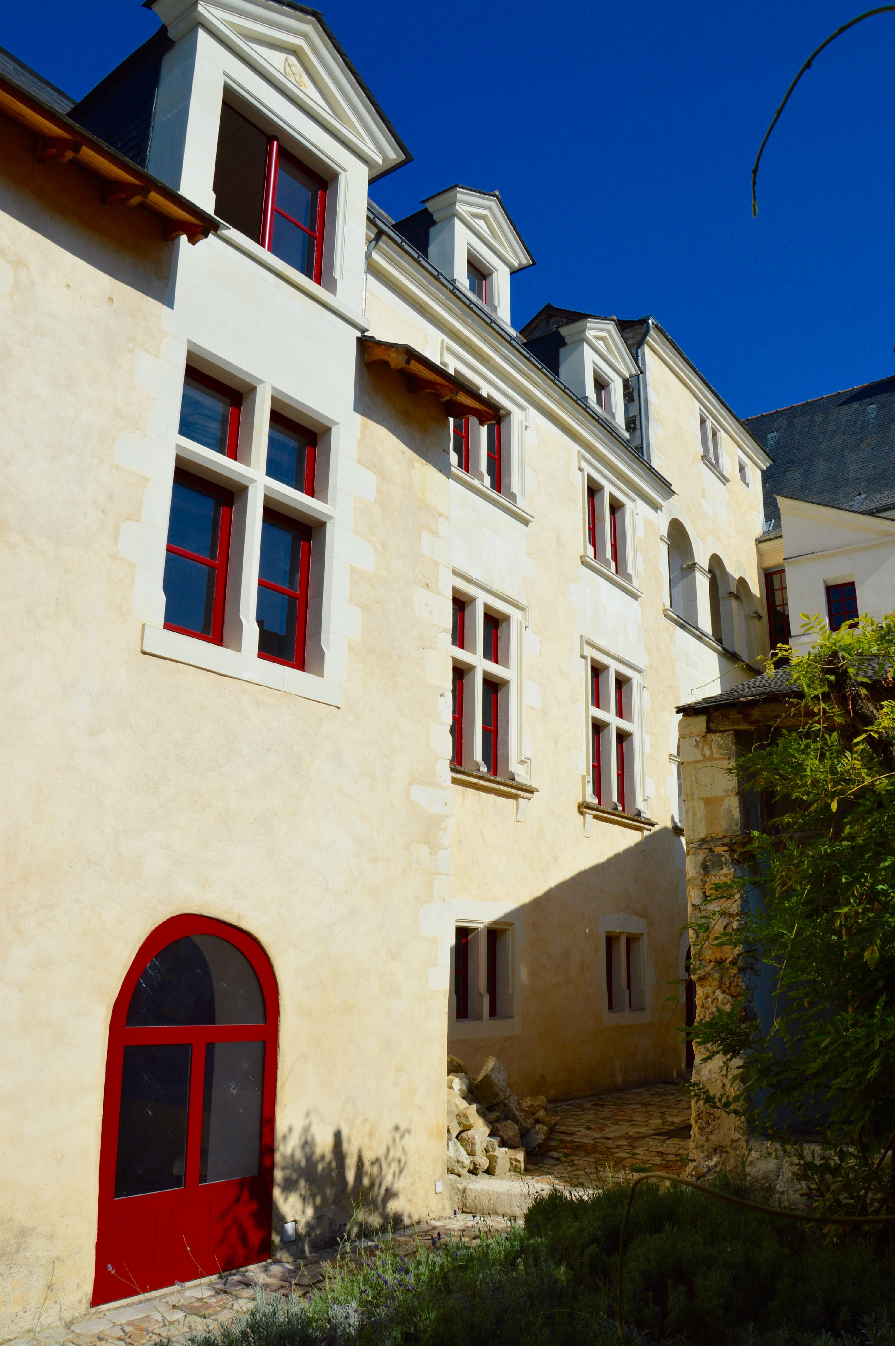 Hôtel particulier Monument Historique Val de Loire